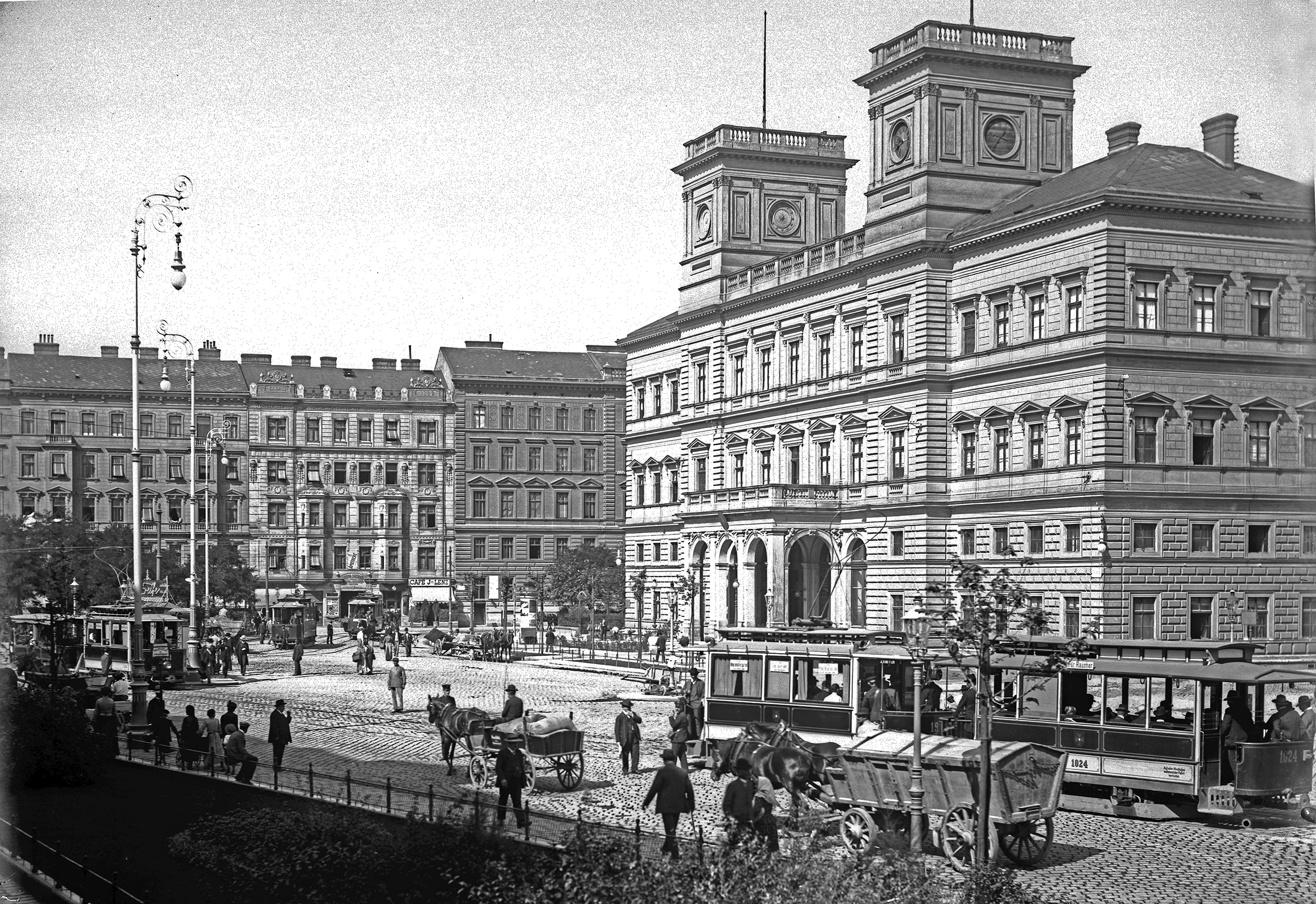 stacio Franz-Josefs-Bahnhof (tiam Kaiser-Franz-Josefs-Bahnhof), Vieno